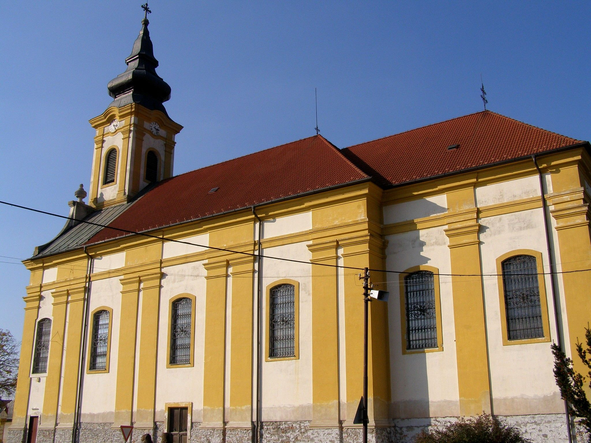 Kostol svätých Petra a Pavla v Záhorskej Bystrici (Bratislava)